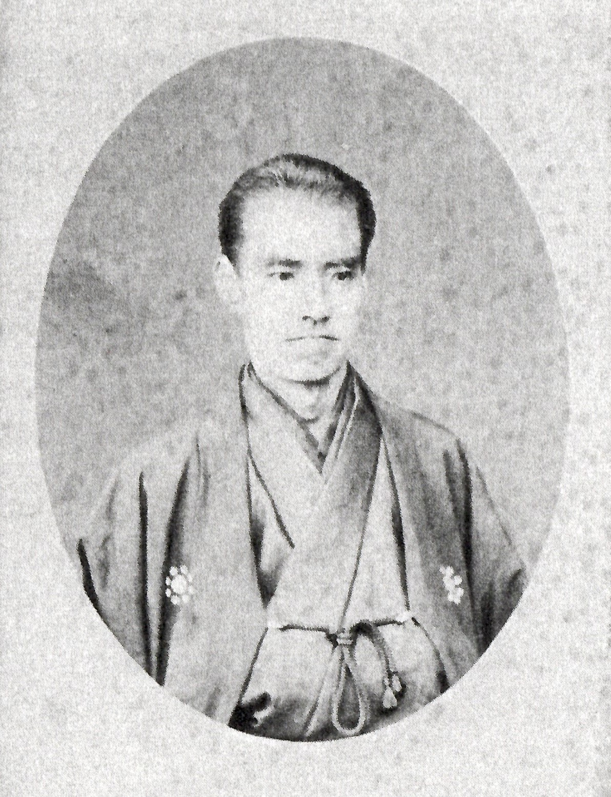 細川立則の肖像写真。